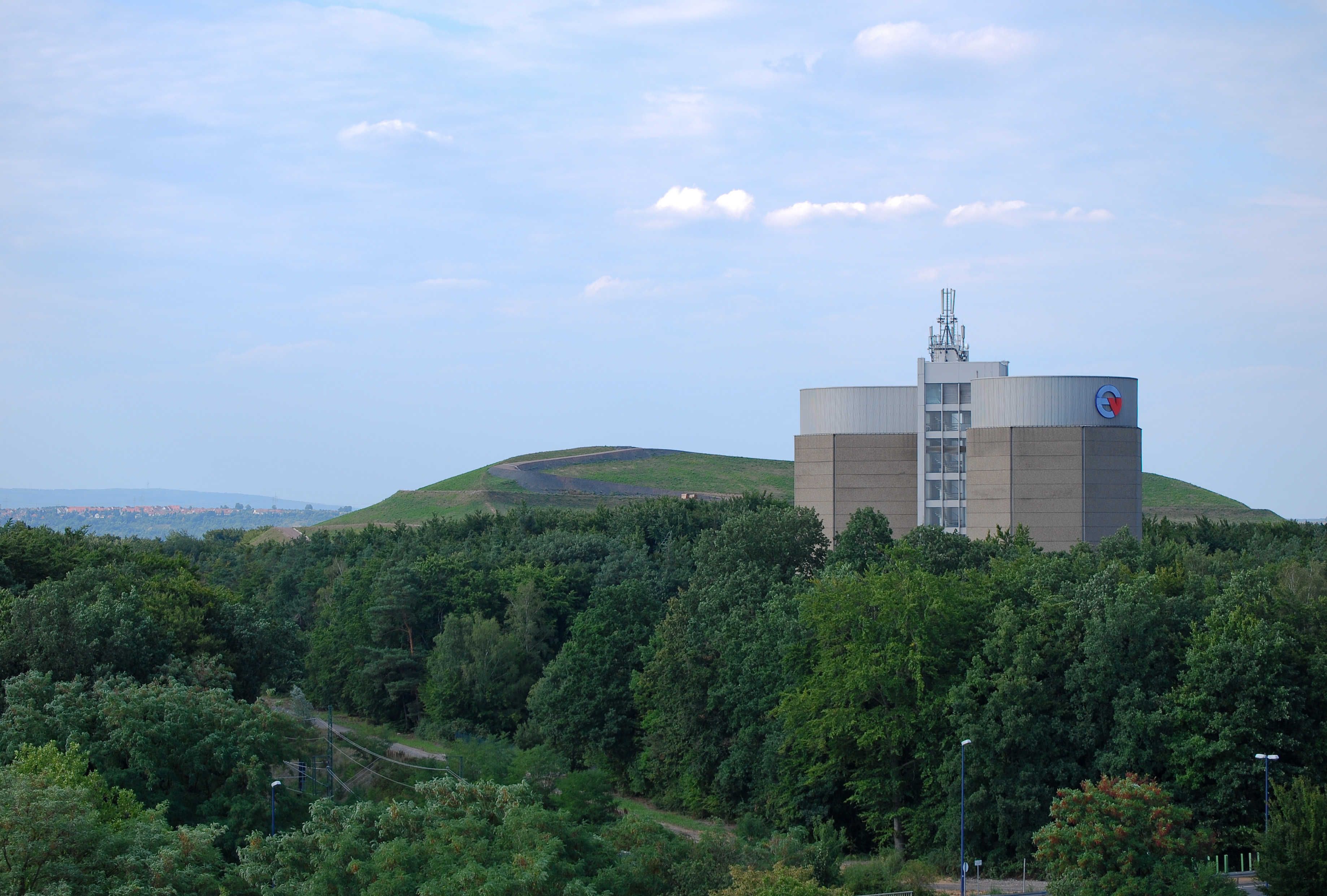 Der Wasserhochbehälter der Energieversorgung Offenbach (EVO). Es ist ein 45 Meter hoher Doppelturm, der 2 x 7.500 Kubikmeter Wasser speichern kann. Neben der Wasserspeicherung soll er durch seinen Standort auf dem Bieberer Berg für natürlichen Druck im Leitungssystem der EVO sorgen. Im Hintergrund der Schneckenberg.